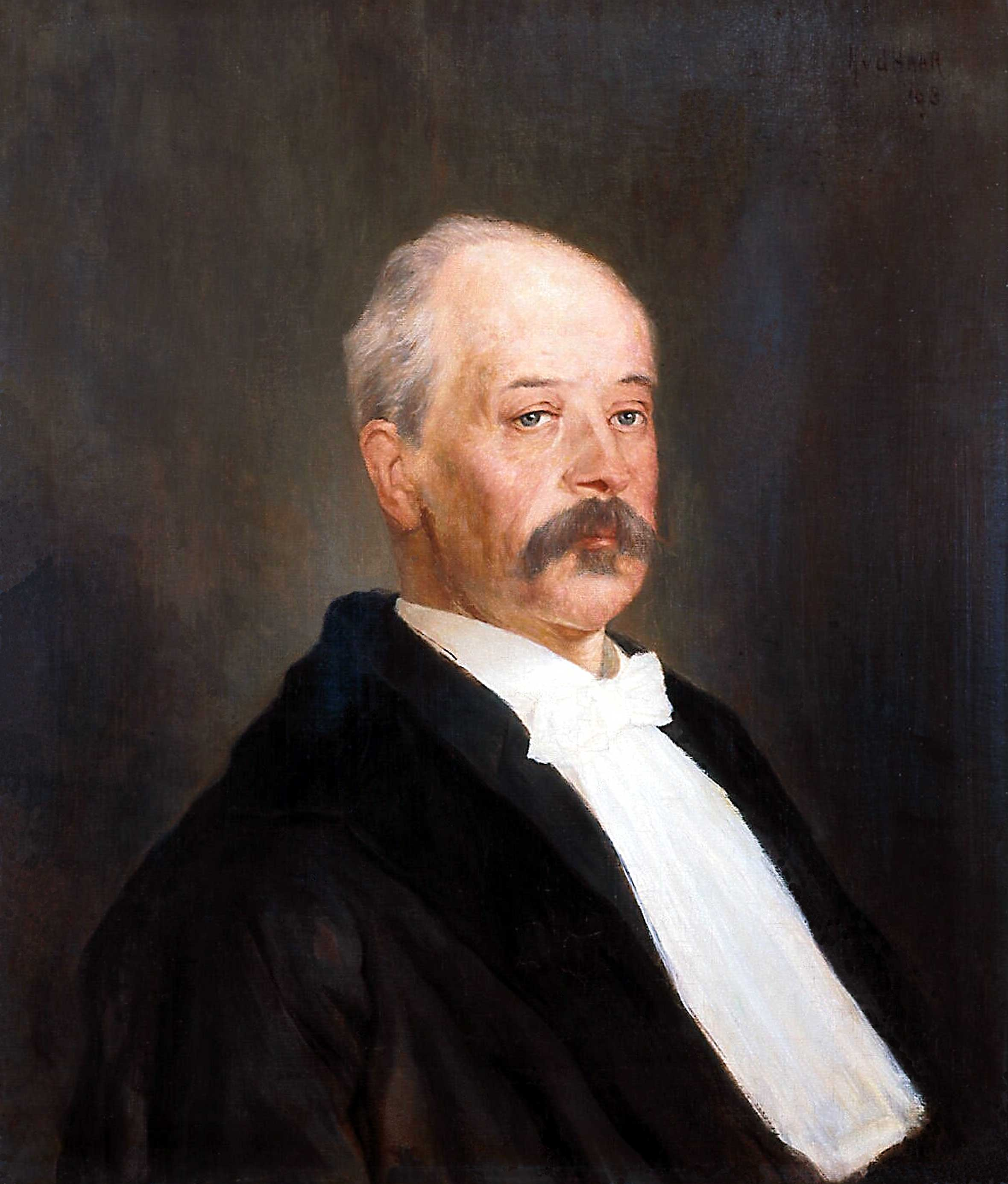 Henri Ernest Moltzer (1836-1895) war ein niederländischer Niederlandtist